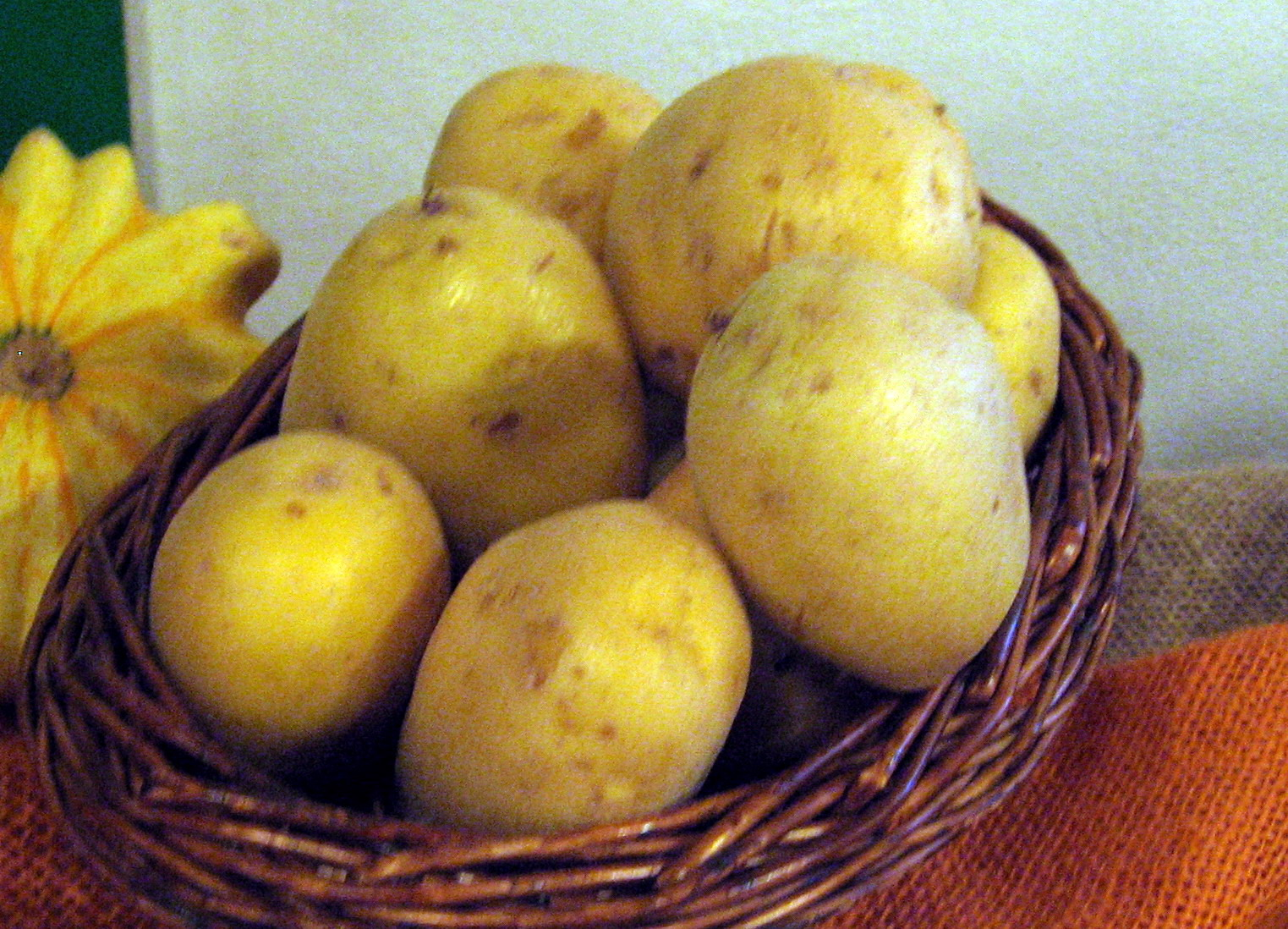 odrůda Agria